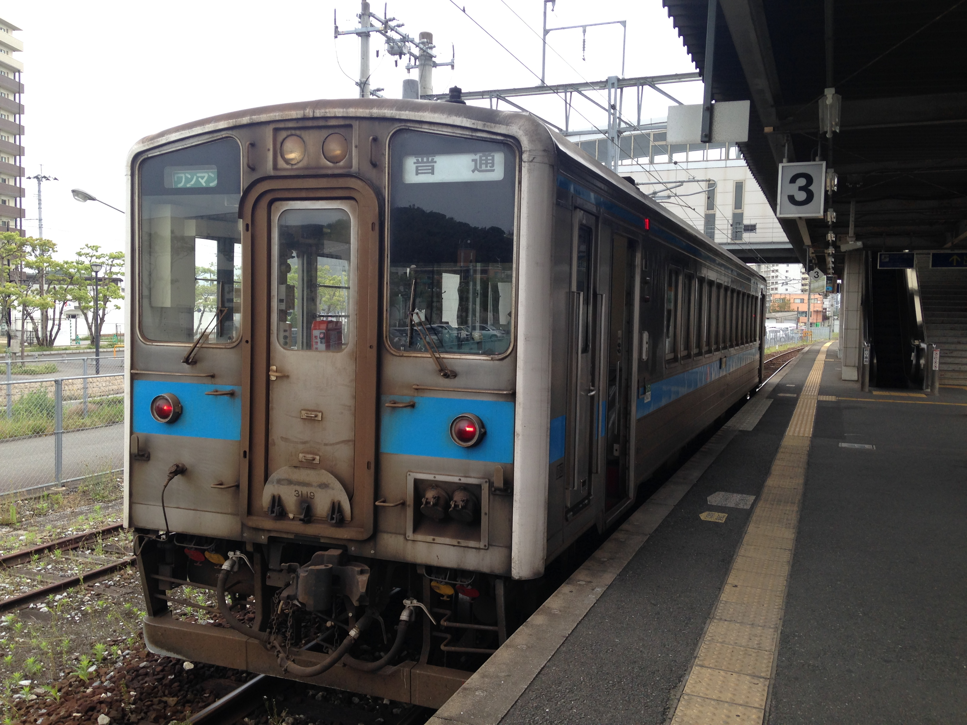 新飯塚駅から発車した前の田川後藤寺行き後藤寺線列車